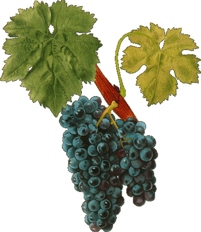 Grappe de Carignan Ampélographie Viala et Vermorel